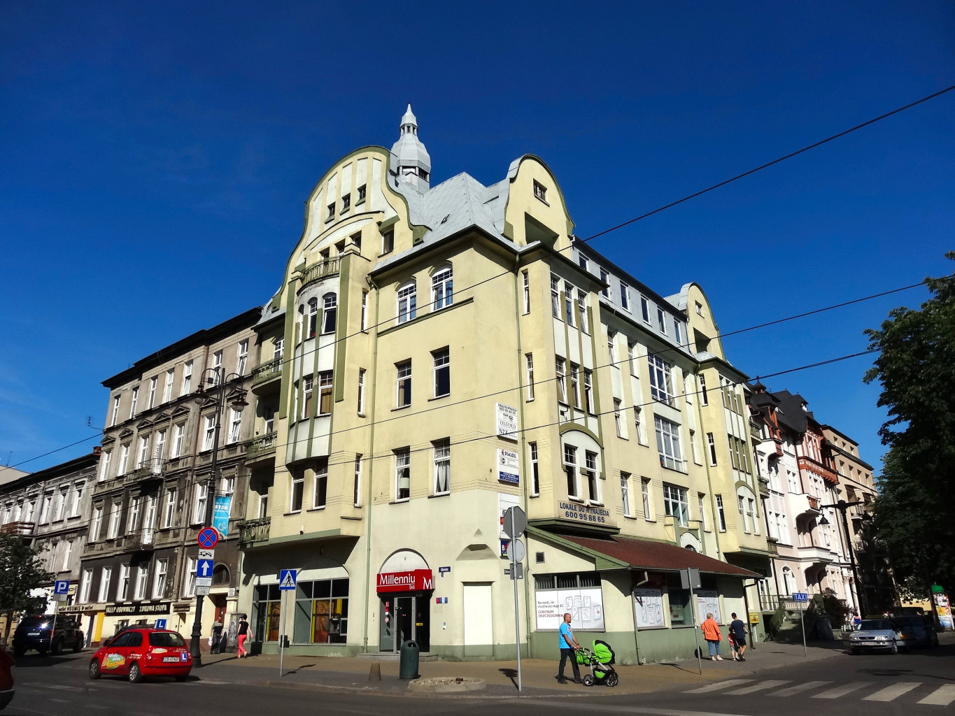 Kamienica ul. Słowackiego 1 róg Gdańskiej w Bydgoszczy (1905-1906, aut. Alfred Schleusener)